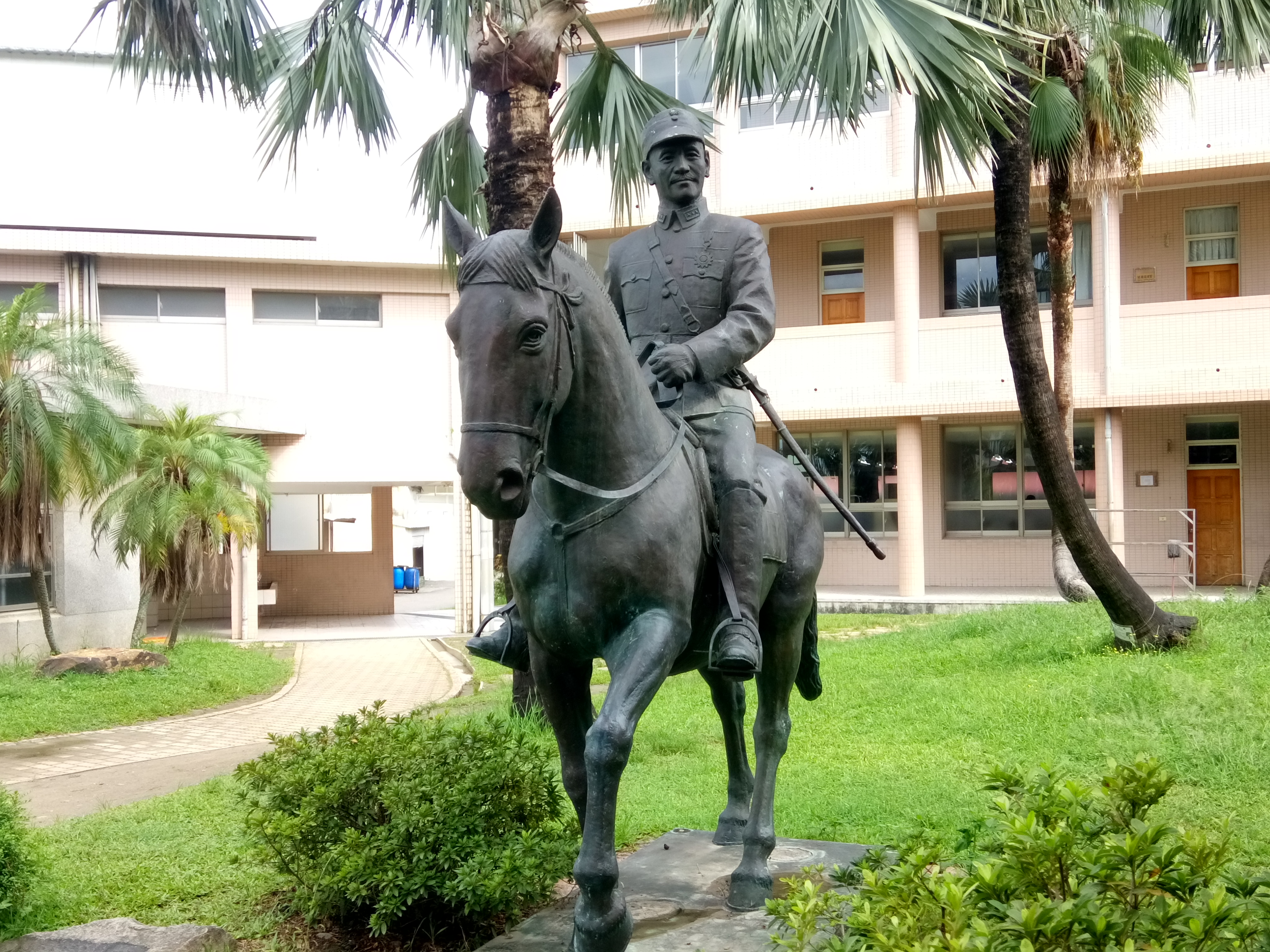 現移置於男生游泳池旁草地